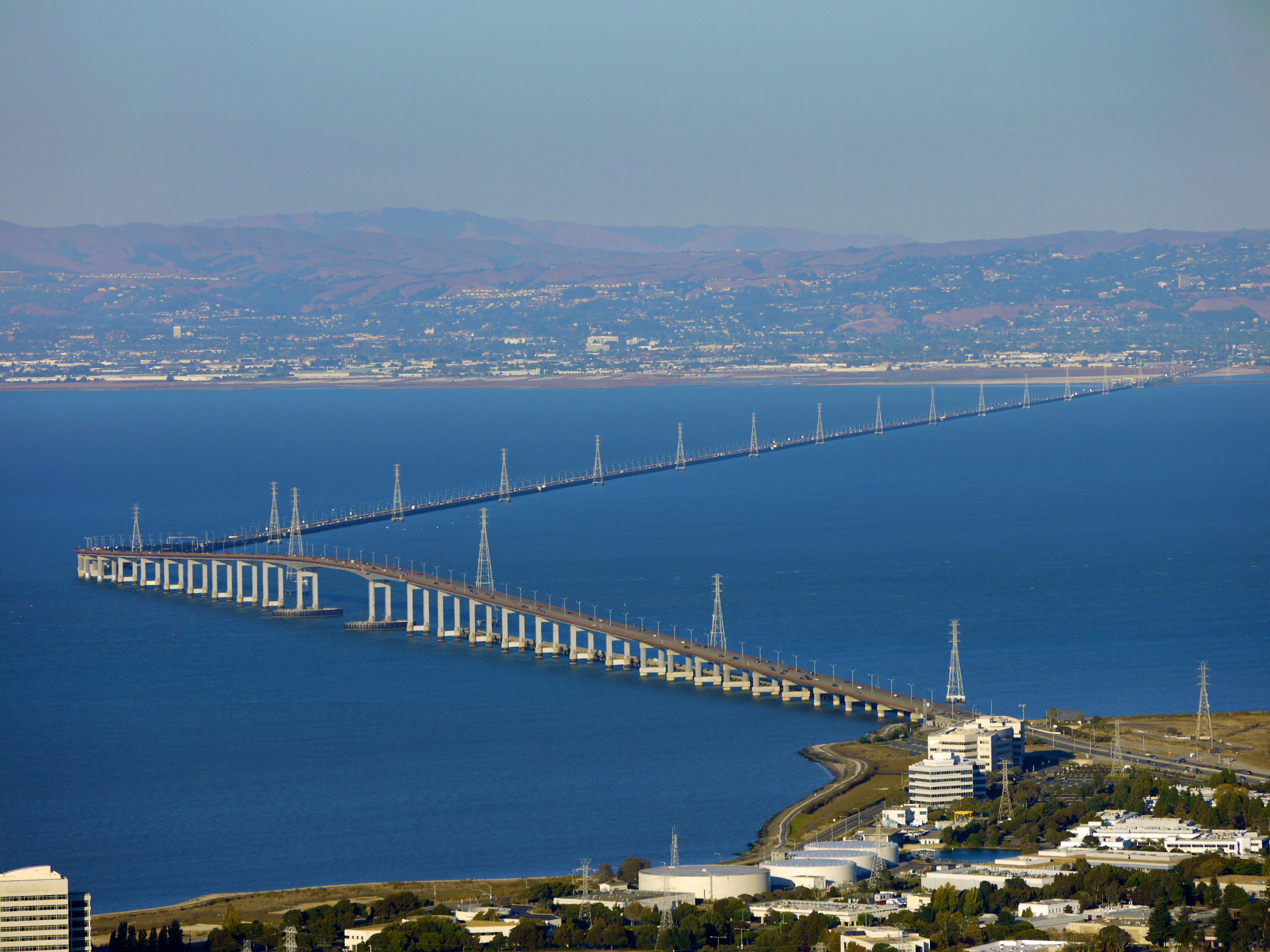 zeppelin-ride-020100925-123